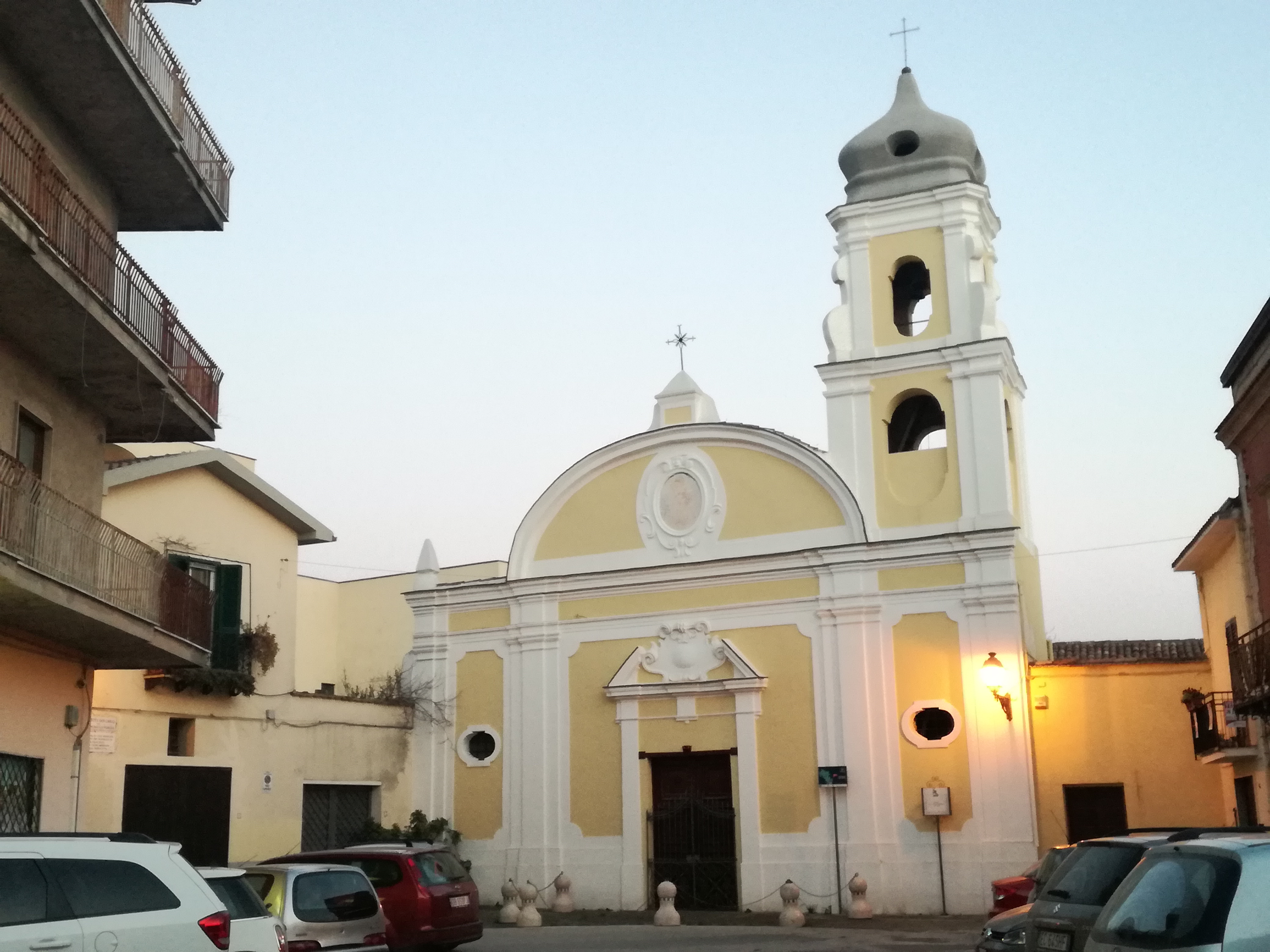 Chiesa di San Carlo Borromeo a Sessa Aurunca